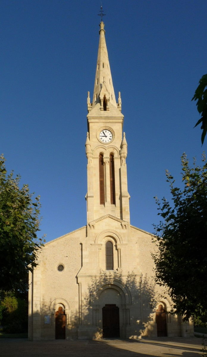 église de Talais, Gironde, France